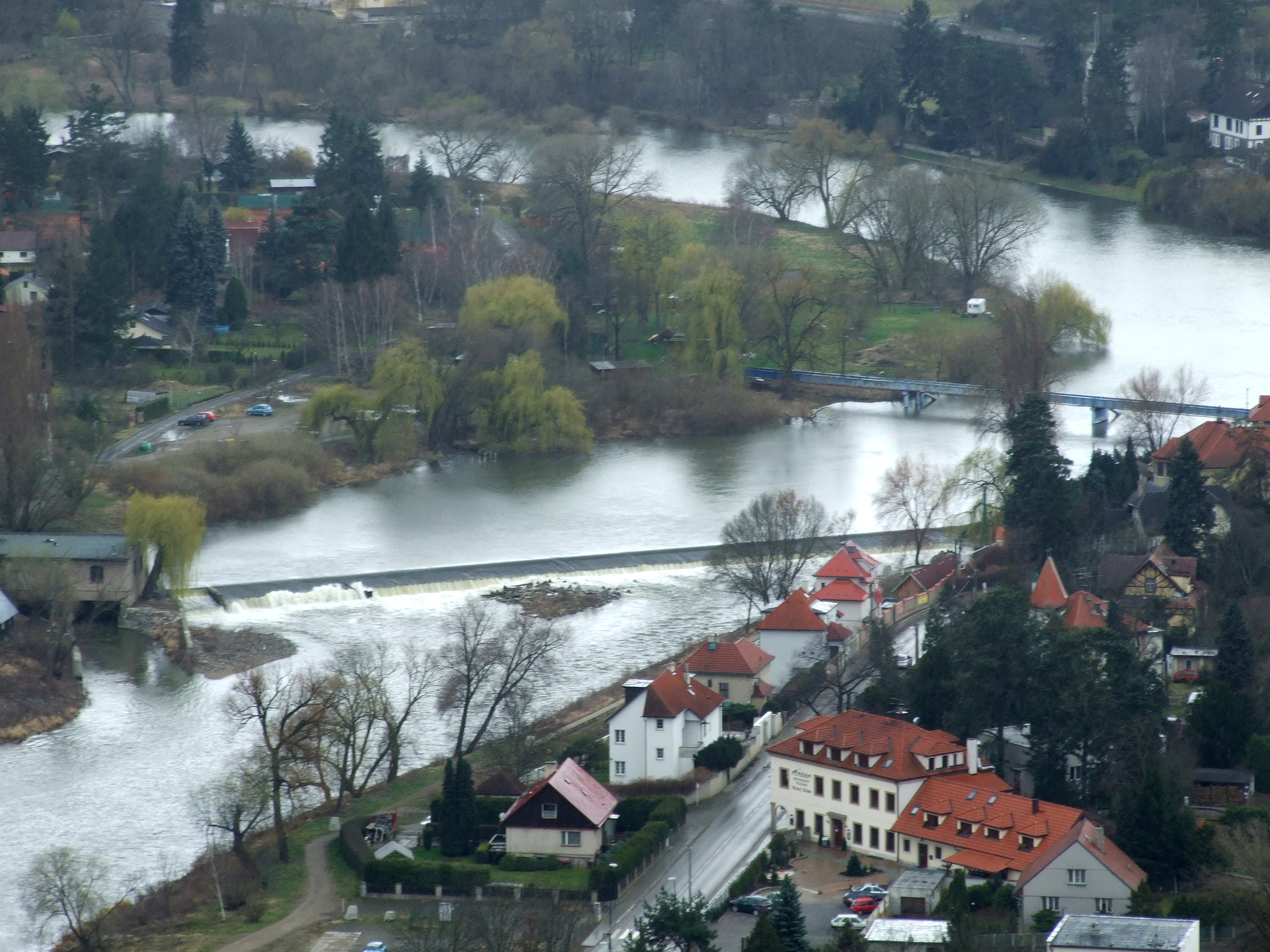 Jez v Černošicích; vlevo Dolní Černošice v městské části Praha-Lipence.